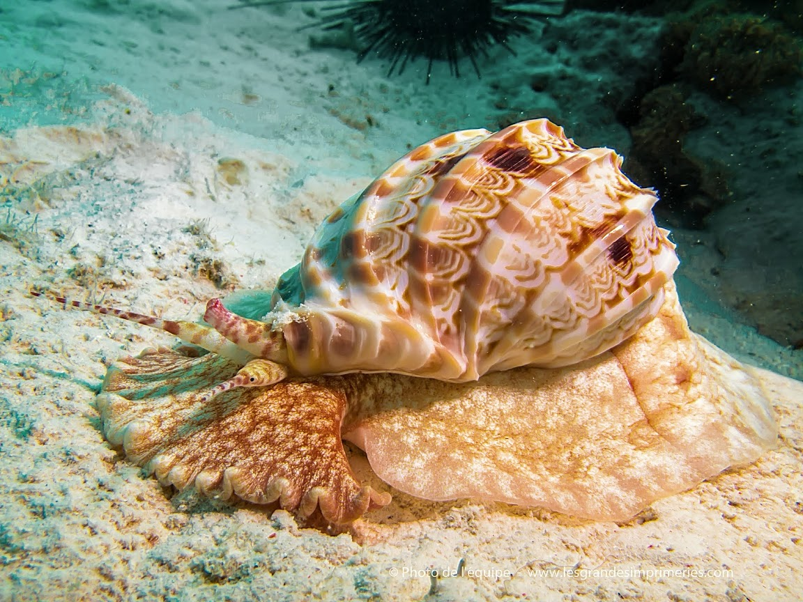 Harpa amouretta prise en photo au Sud-Est de la Tanzanie longueur 20 cm. Photo à retrouver ici